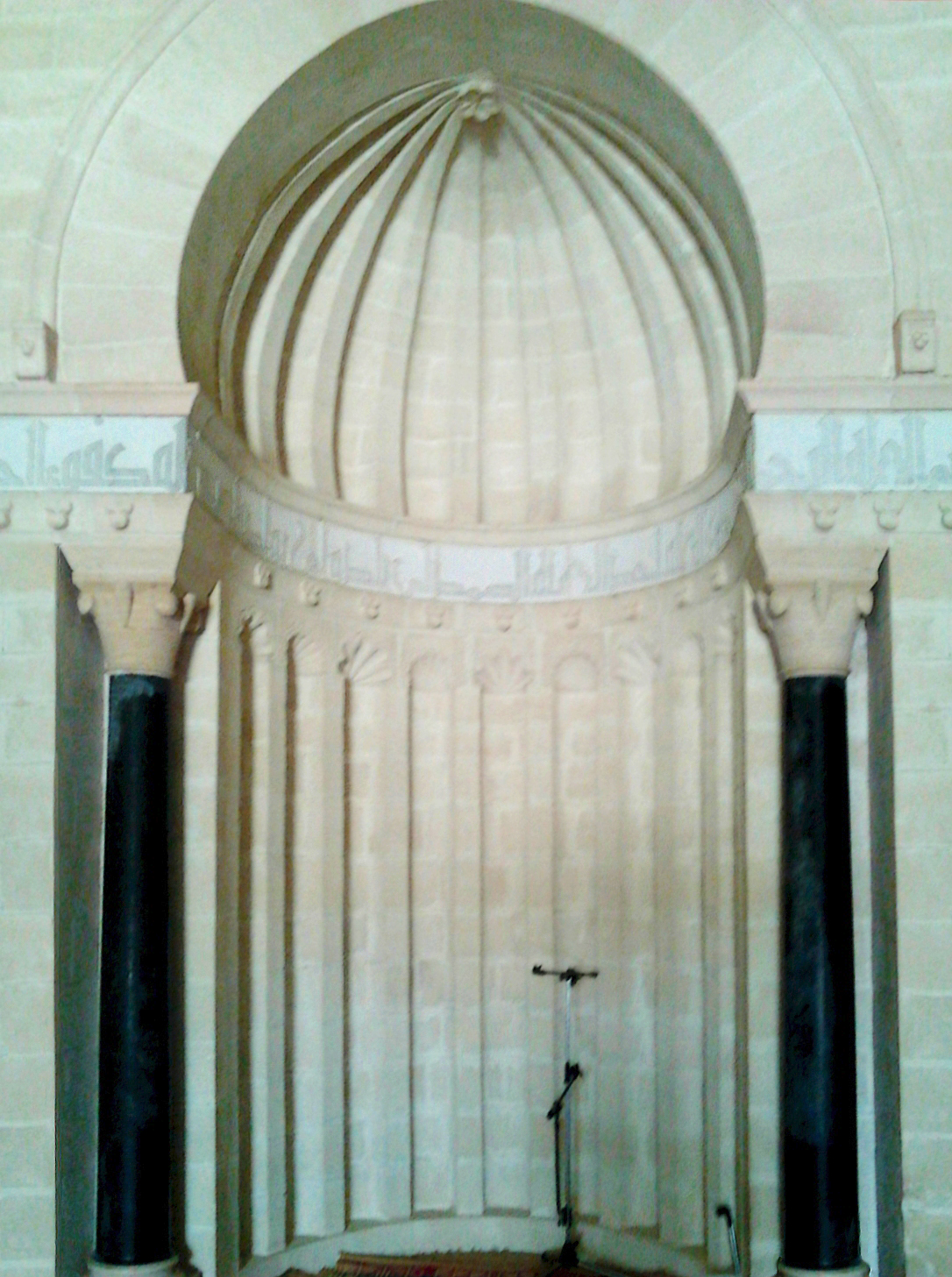 Le grand mosquée de Mahdia (mosquée Fatimide): Mihrab